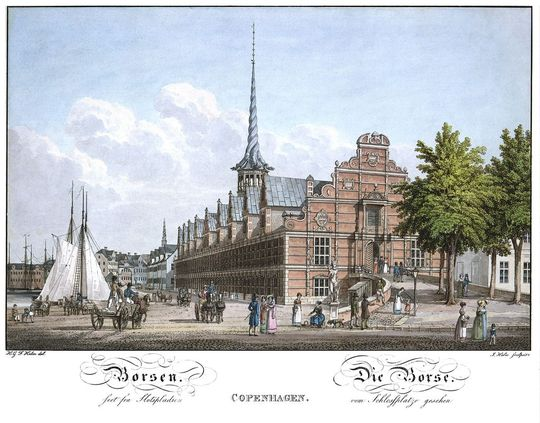 Børsen, ca. 1823. Set fra Slotspladsen. Kobberstik af H.G.F. Holm